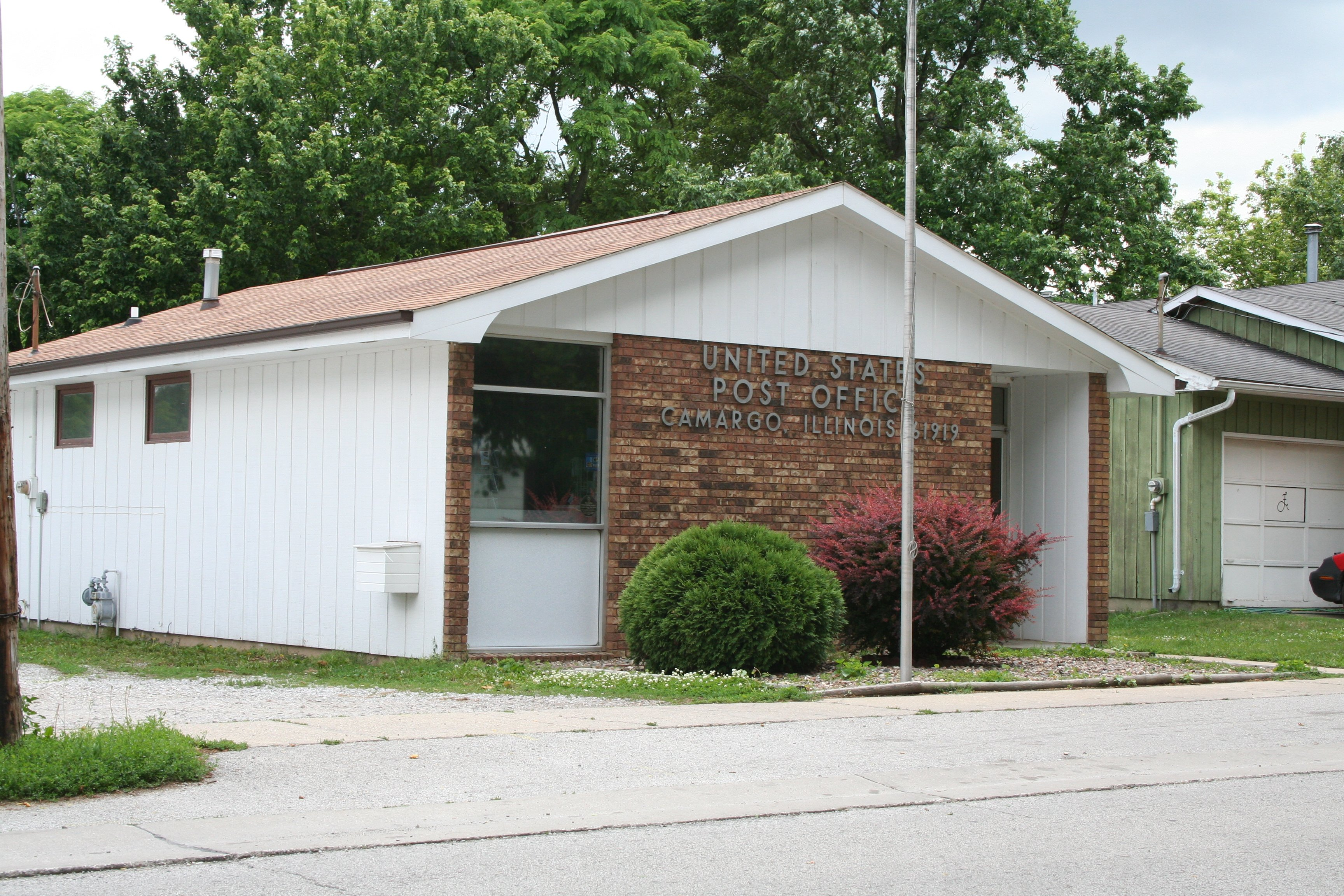 Camargo_Illinois_Post_Office